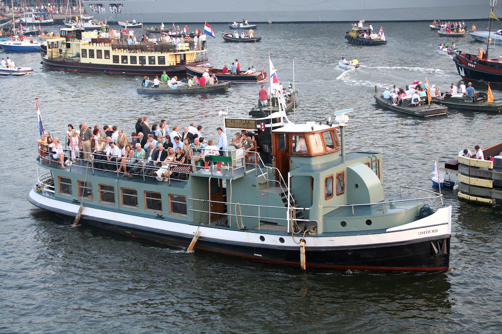 IJveer XIII op een rondvaart tijdens Sail 2005. Foto: Erik Swierstra.